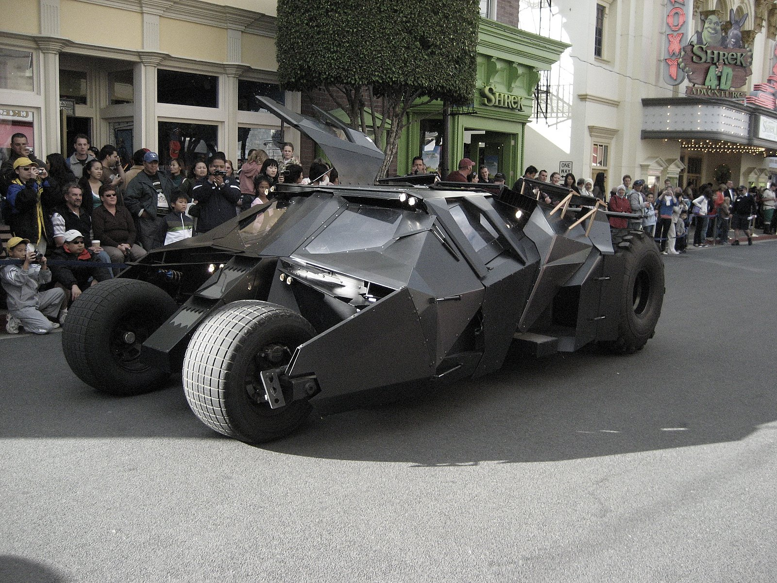 Batmobile from Batman BeginsBatmobile